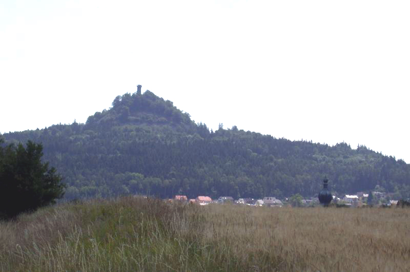 Der Rauhe Kulm